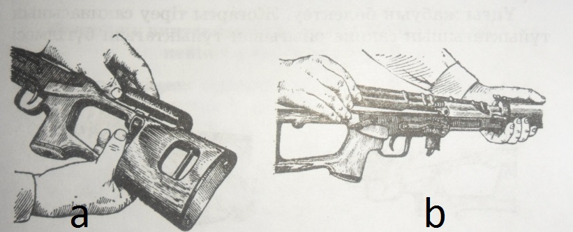 Handhabung des SWD-Scharfschützengewehres.